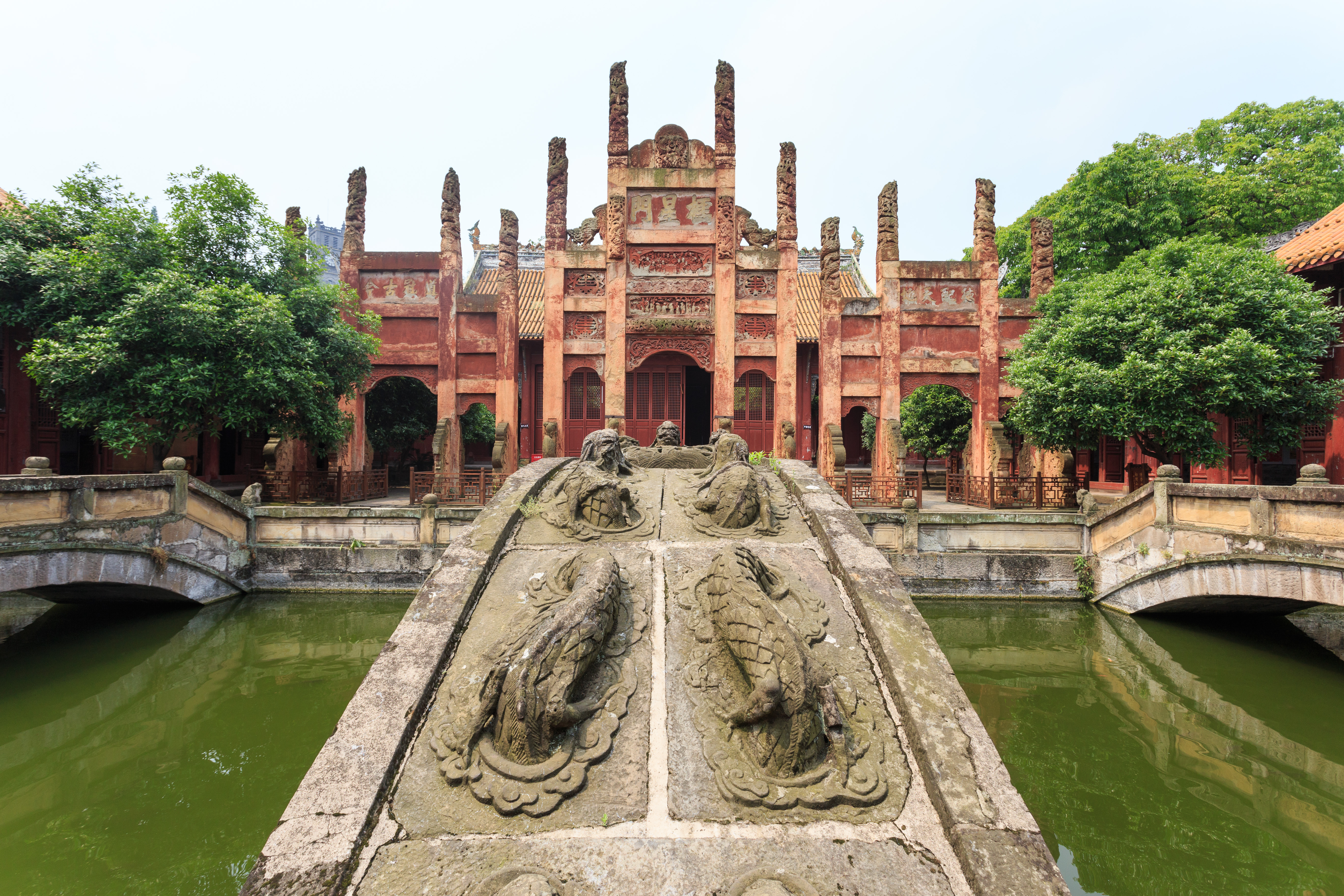 富顺文庙—— 泮池和棂星门